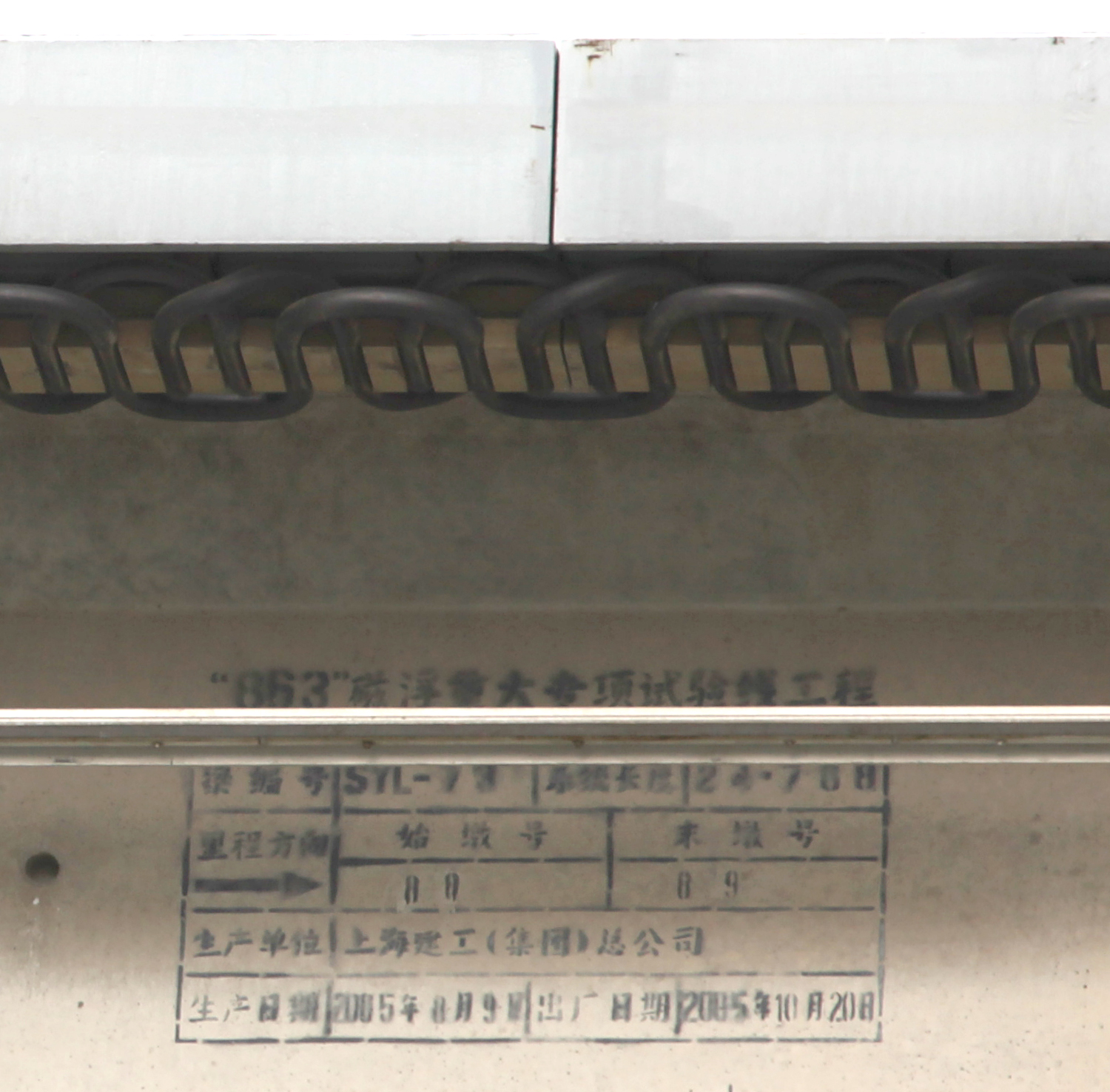 Strator der Teststrecke der TOngji Universität, Jiading Campus, Shanghai. Neben einer Detailaufnahme des Strator ist auch die Sprüh-Markierung auf der Betontrasse zu sehen: Die Strecke ist Teil des 863 Hochtechnologieprogramms. Weiterhin werden Hersteller und Herstellungsdatum angegeben.